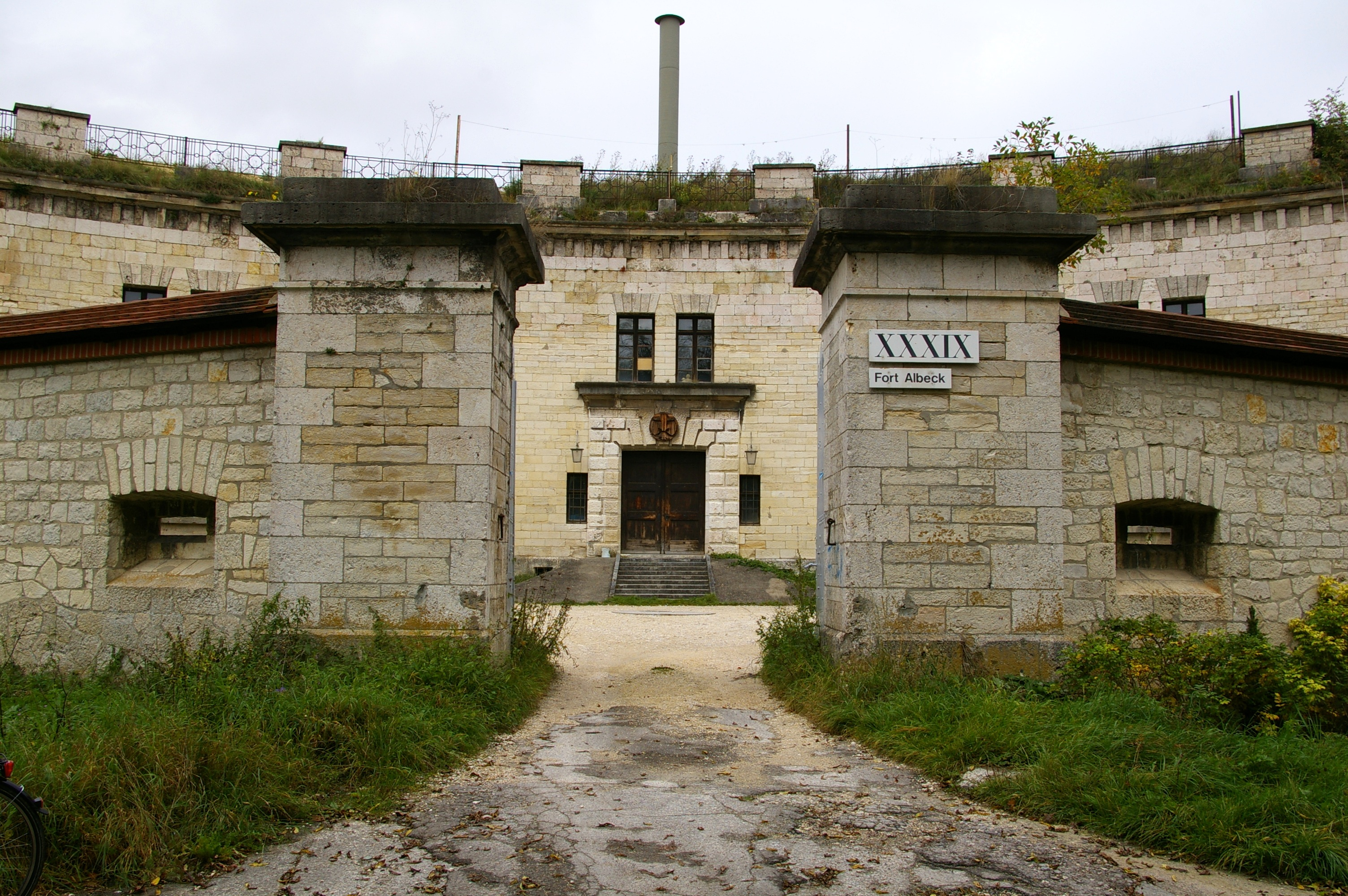 Werkseingang zu Fort Albeck